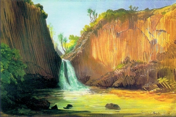 La cascada y los prismas basálticos de Santa María Regla. 24 de agosto de 1832 Óleo / cartón 27.9 x 41.3 cm